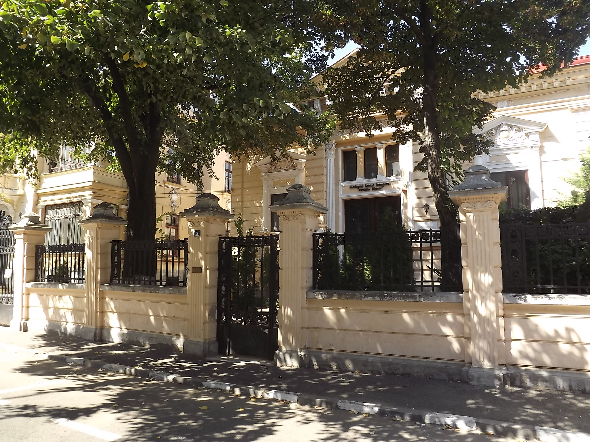 Casărfgh